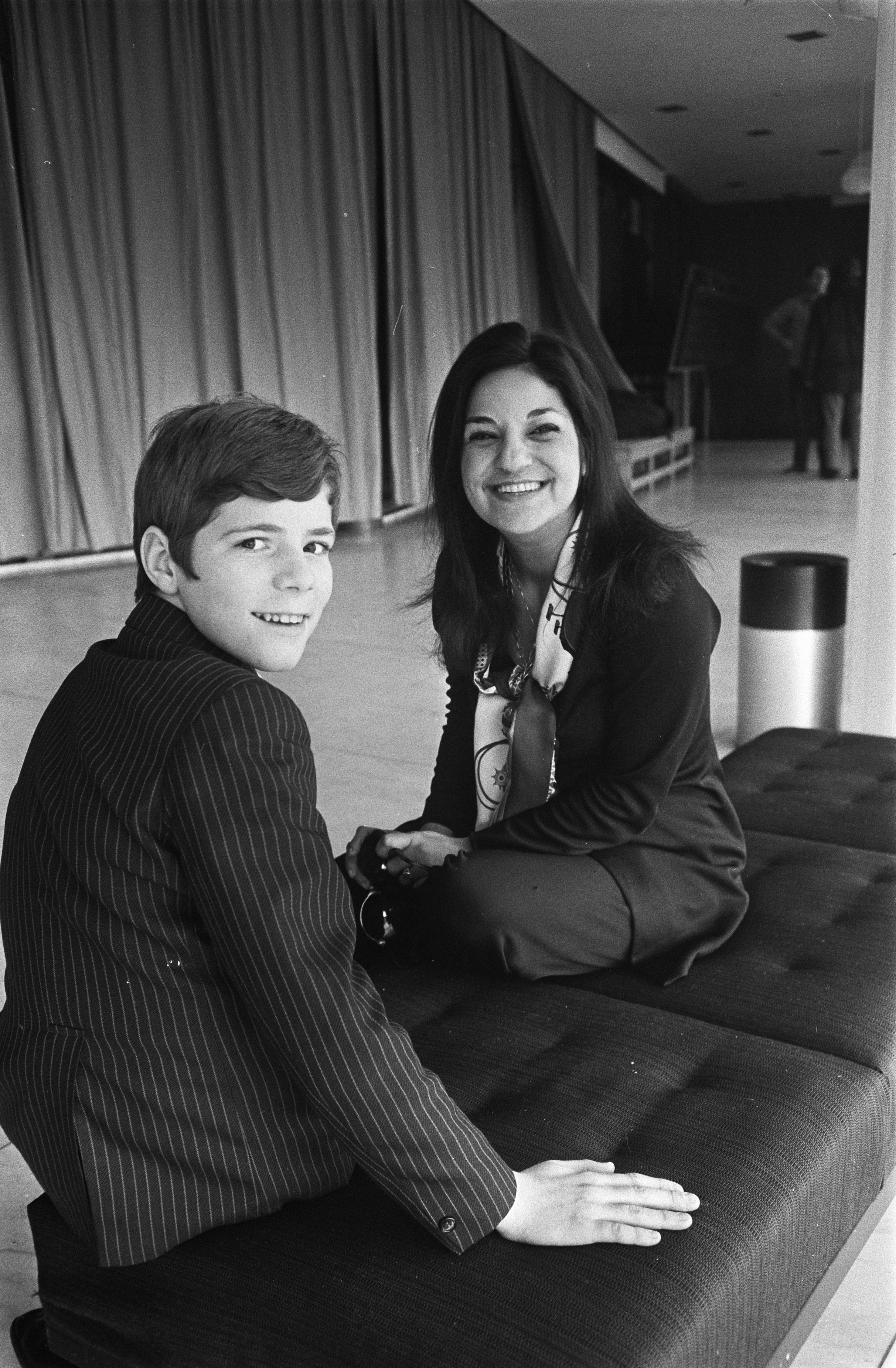 Collectie / Archief : Fotocollectie Anefo Reportage / Serie : [ onbekend ] Beschrijving : Grand Gala du Disque , Amsterdam. Repetities Heintje en Frida Bocara (Franse zangeres) Datum : 25 februari 1970 Locatie : Amsterdam, Noord-Holland Trefwoorden : zangeressen Persoonsnaam : Frida Bocara, Heintje Fotograaf : Koch, Eric / Anefo Auteursrechthebbende : Nationaal Archief Materiaalsoort : Negatief (zwart/wit) Nummer archiefinventaris : bekijk toegang 2.24.01.05 Bestanddeelnummer : 923-2937